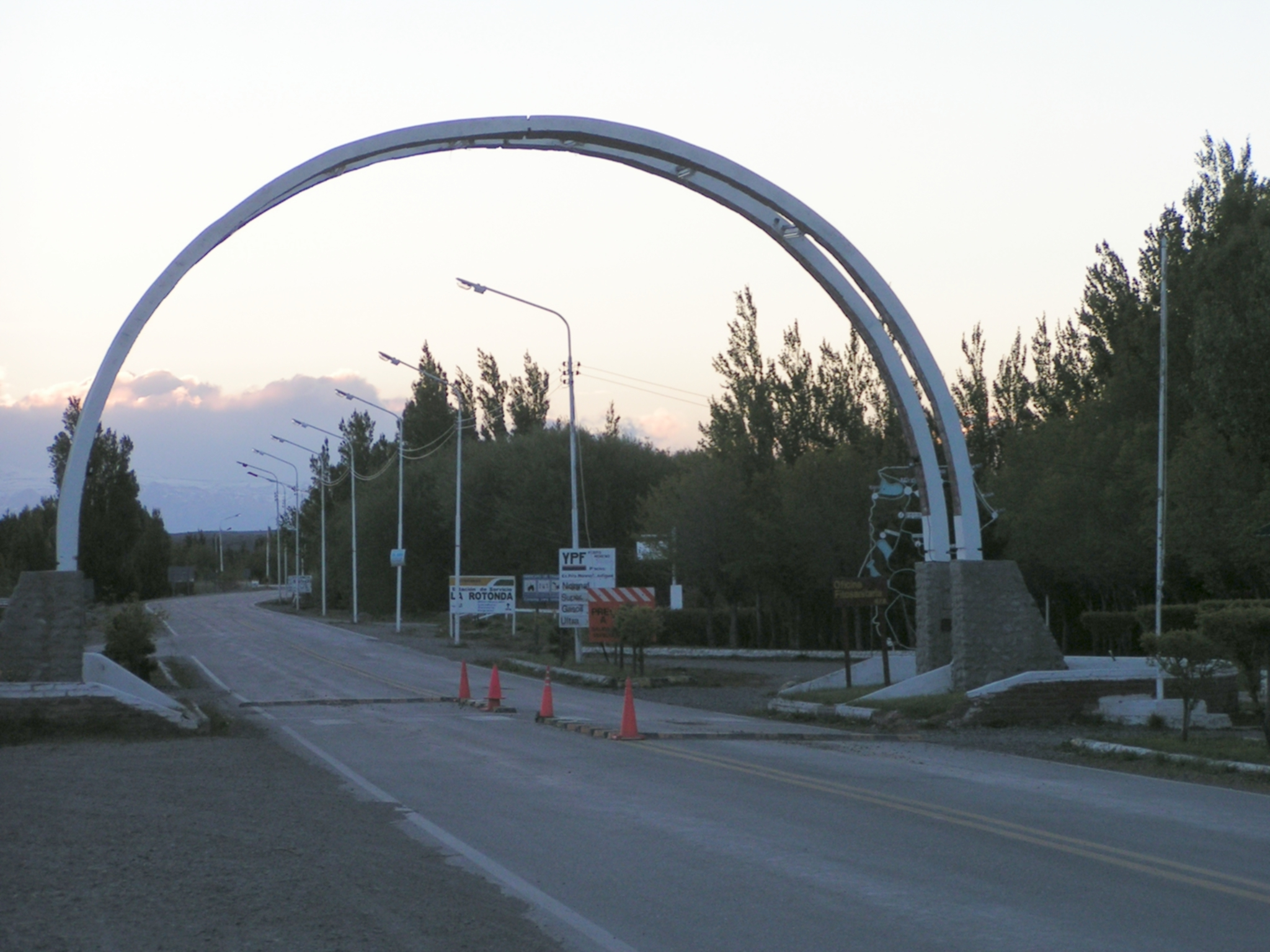 En la imagen se puede apreciar la entrada, por la Ruta Provincial Nº43 a la localidad de Perito Moreno.